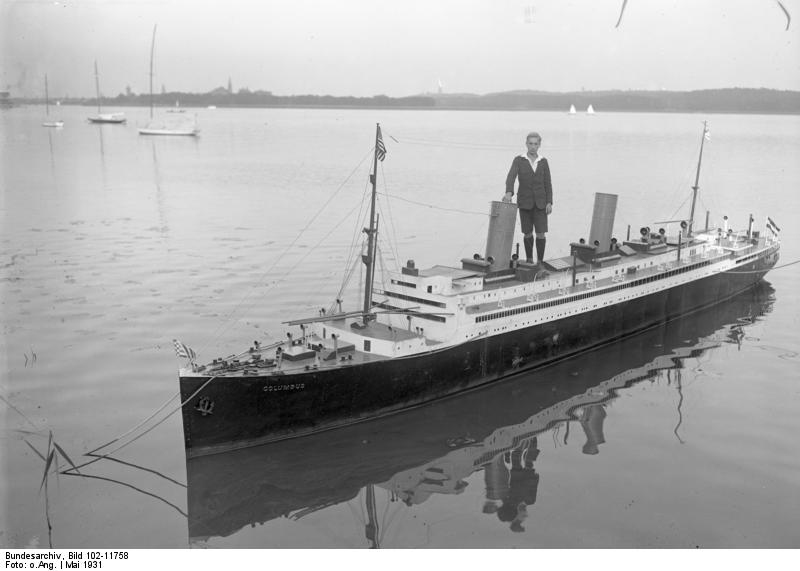 Das grösste Schiffsmodell der Welt! Ein 12 m langes naturgetreues Modell des Lloyd-Ozeandampers "Columbus" wurde von Schülern der Modellscshule des Marine-Ober-Ing. Bartsch in Potsdam erbaut. Das Schiff ist mit einem elektrischen Benzin-Siemensmotor ausgerüstet. Der Bau kostete M 15.000,--.